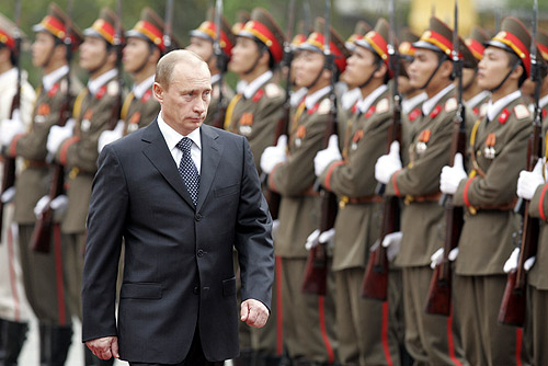 Vladimir Putin in Vietnam in 2006